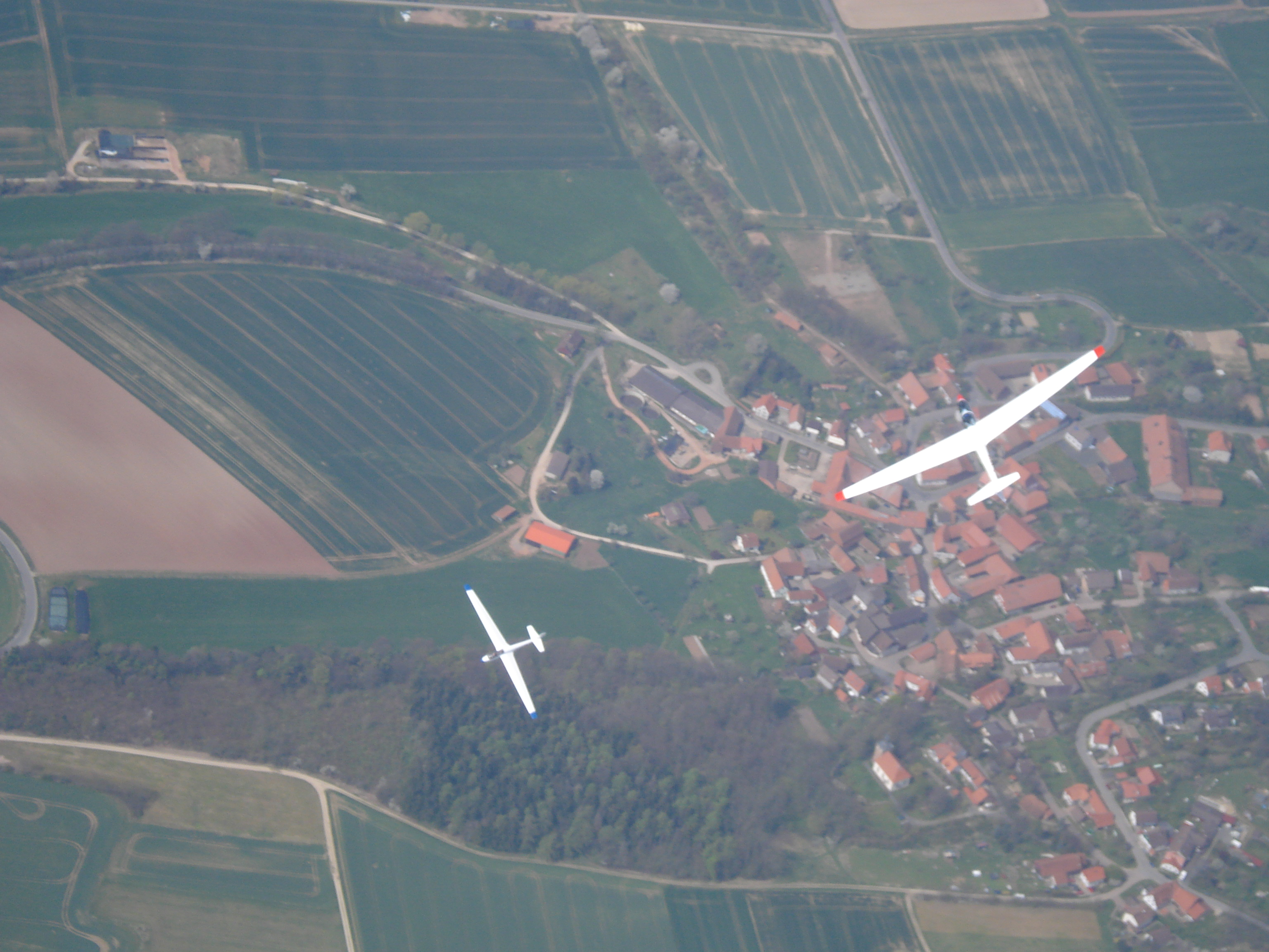 Segelflugzeuge ASK_21_+ASK_13 der Luftsportvereinigung Göttingen in der Thermik